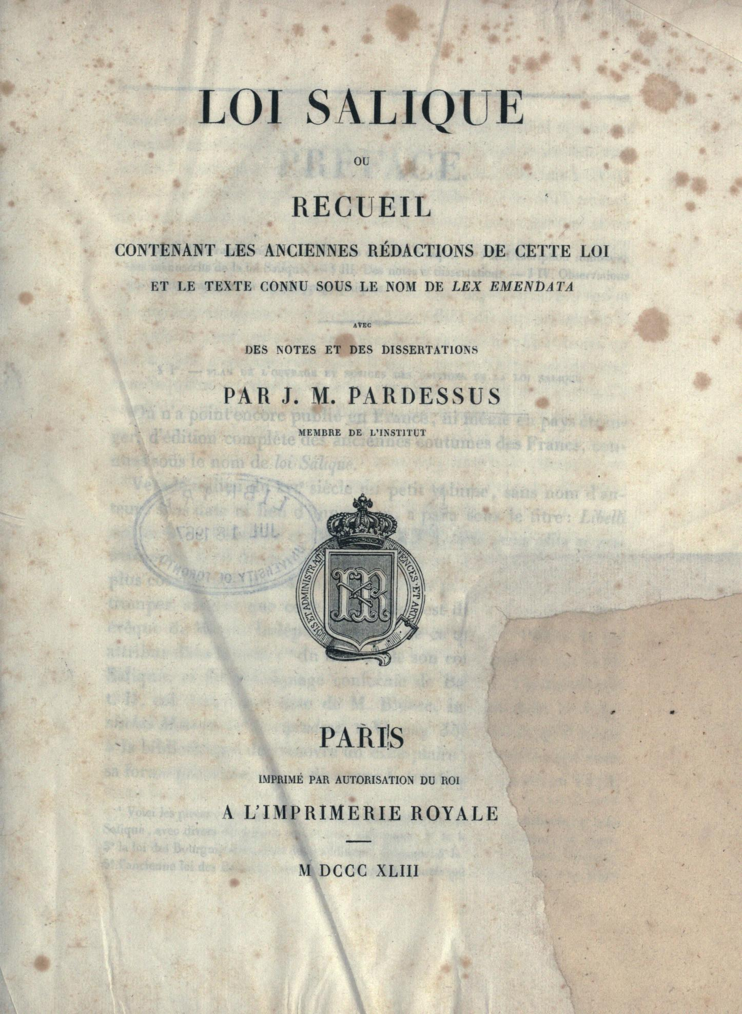 Loi salique; ou, Recueil contenant les anciennes rédactions de cette loi et le texte connu sous le nom de Lex emendata